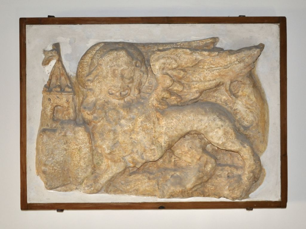 Leone nimbato ed alato, che tiene tra le zampe un castello con banderuola . Località di provenienza: Iraklion, Creta. Attualmente il calco in gesso è conservato presso l'Istituto Veneto di Scienze, Lettere ed Arti.